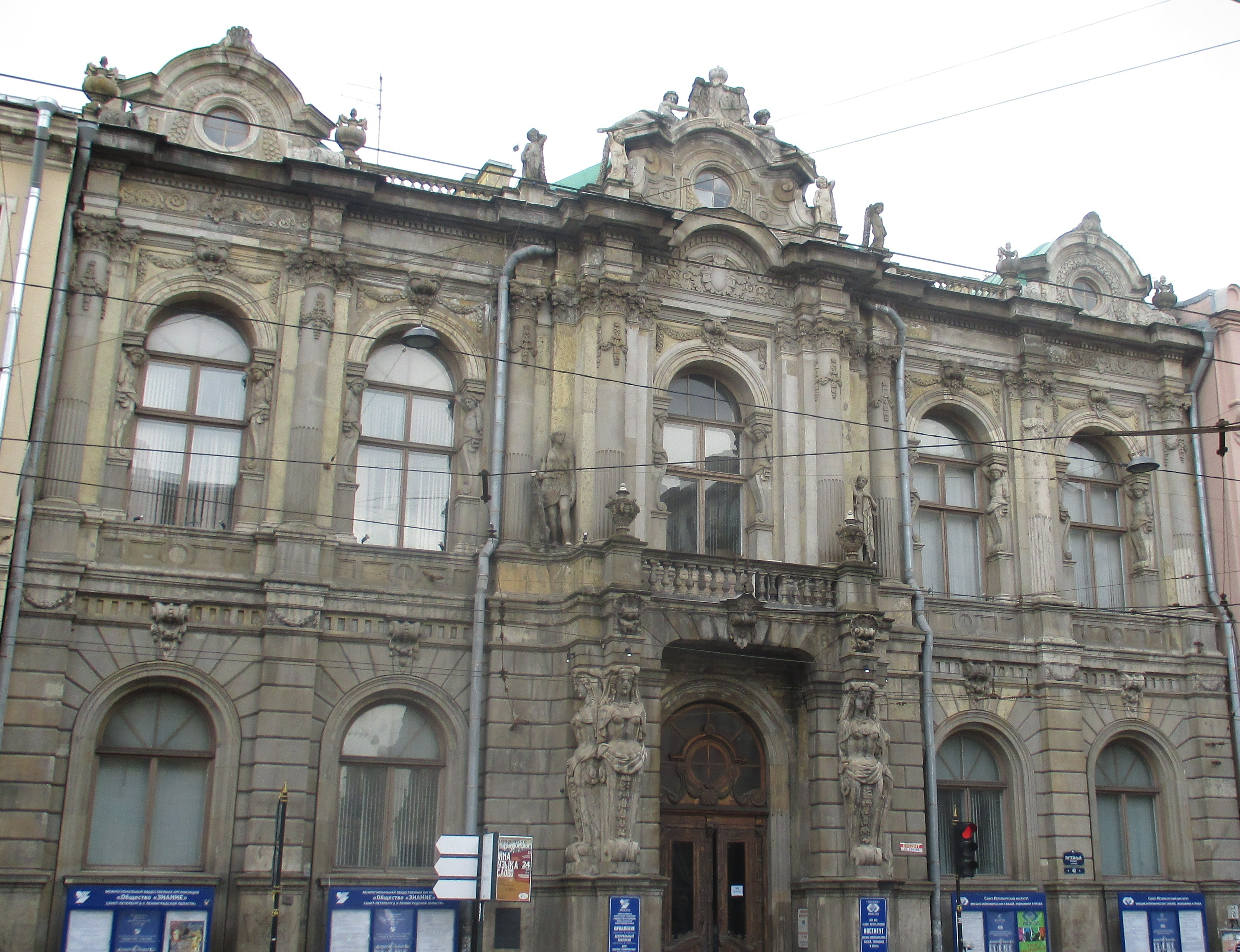 Ancien hôtel particulier de la princesse Youssoupoff née Narychkine, 42, Liteïny Prospekt (perspective Liteïny) à Saint-Pétersbourg